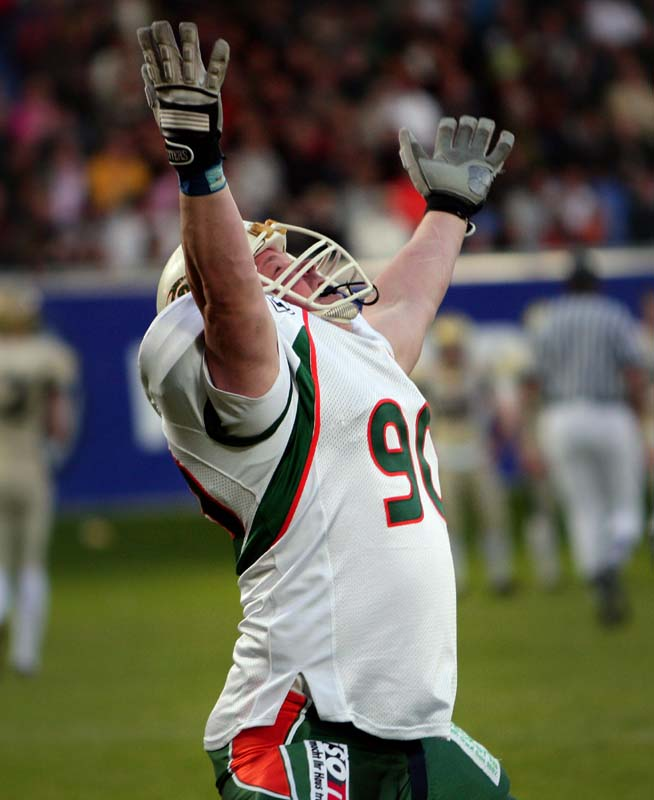 Алексей в игре празднует свои первые пункты которые он принес своей команде против игры с Dresden Monarchs